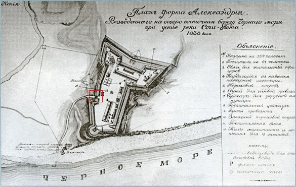 План форта Александрия в устье реки Сочи, положивший начало городу Сочи